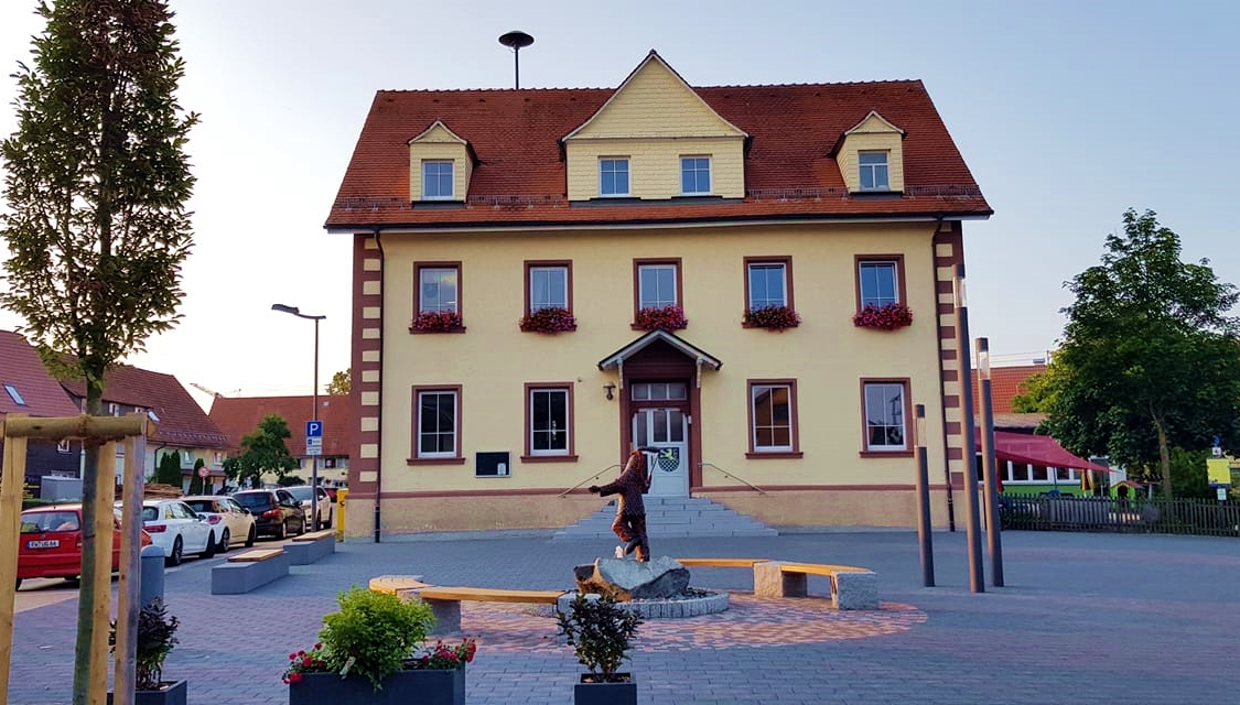 Ortsmitte Hochemmingens mit dem Rathaus.